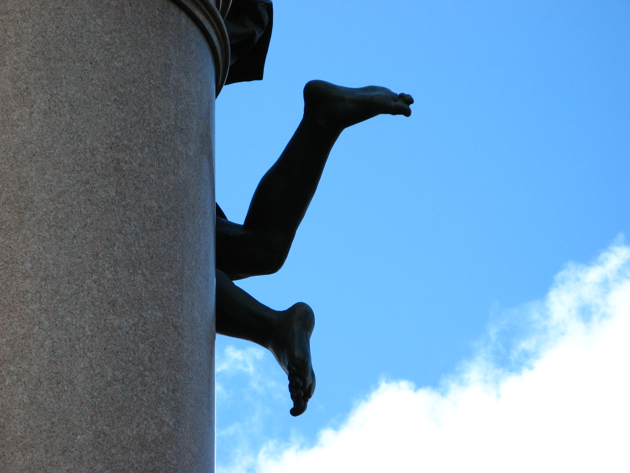 Львів,_пам._Міцкевичу_(ноги_крилатого_генія).jpg: Львів, пам'яткик Міцкевичу (ноги крилатого генія)